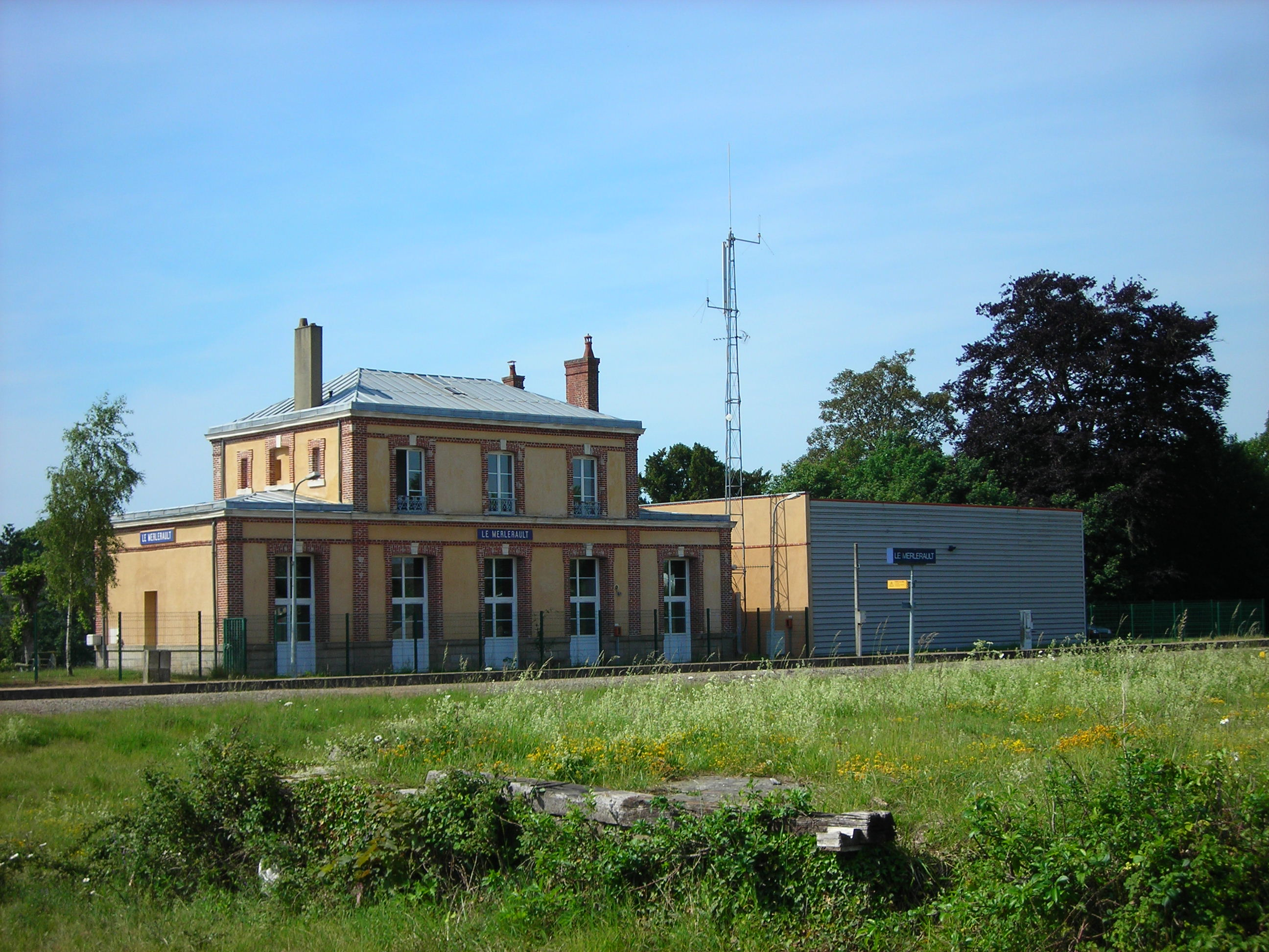 Gare du Merlerault (Orne, France), vue de coté quaie, bâtiment voyageur.